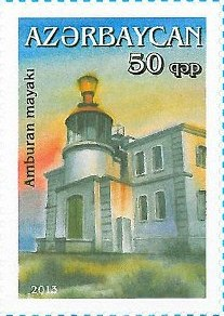 Lighthouses of Azerbaijan. N 1081 - 50 qapik. There are pictured Amburan lighthouse on the stamp.